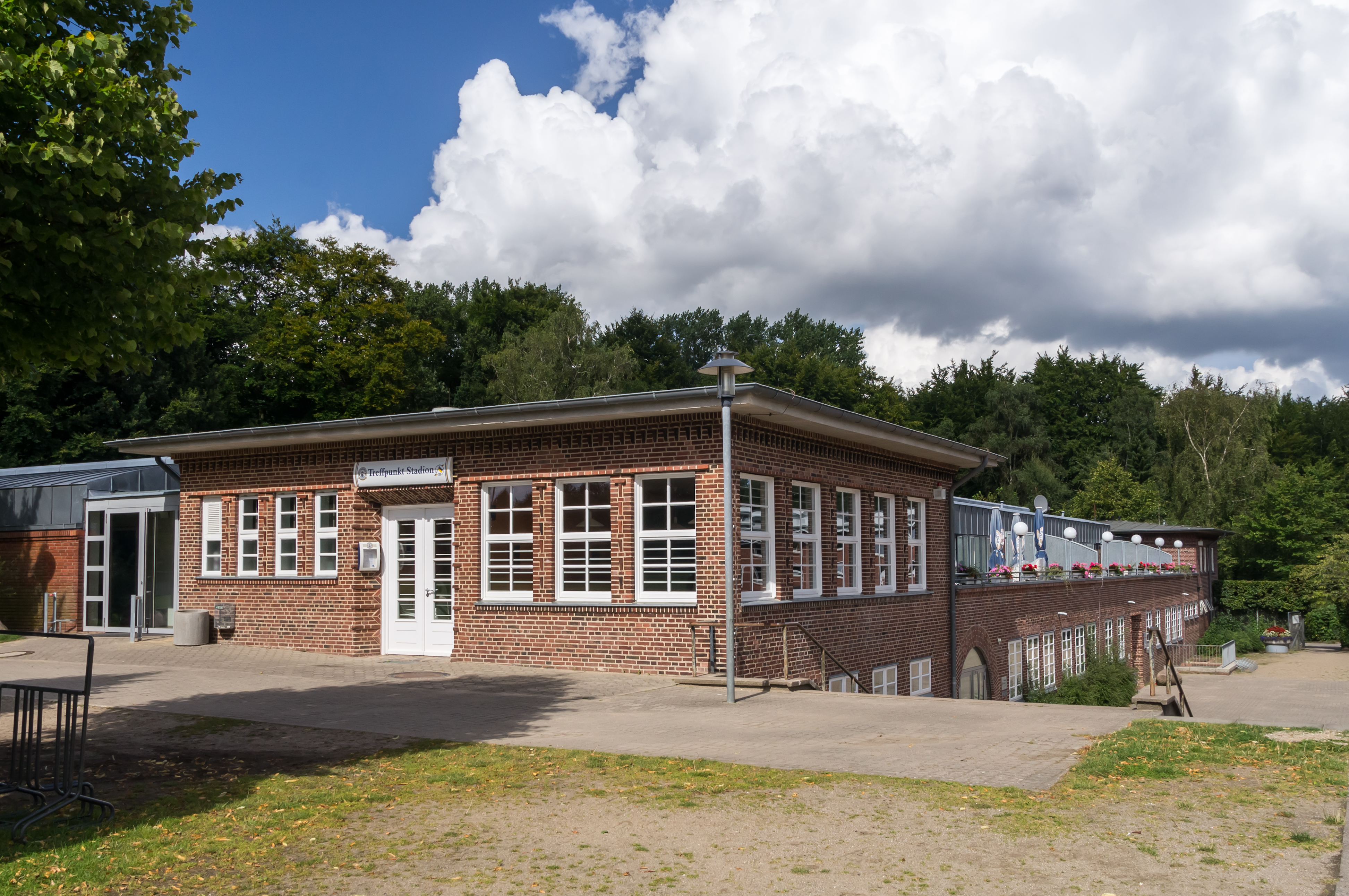 Flensburg-Fruerlund: Arndstrasse 5; Stadion - Versorgungsgebäude; Denkmal-Nr. 3,2